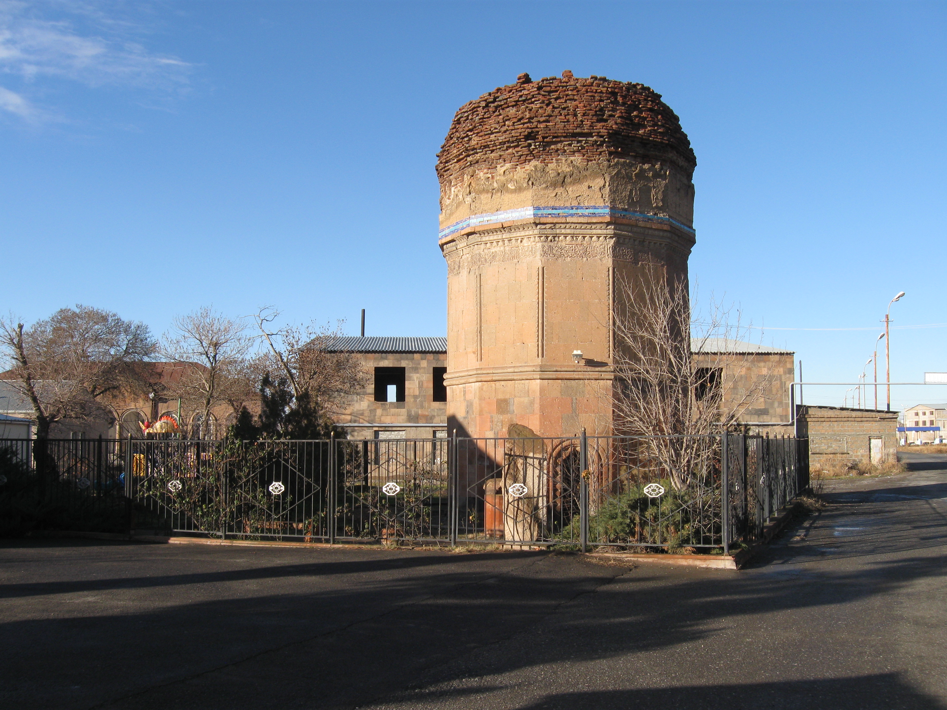 Կարա-Կոյունլուների դամբարան, Արգավանդ, 1413 թ. 18/1